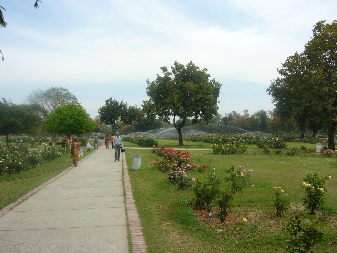 Rose Garden Chandigarh India